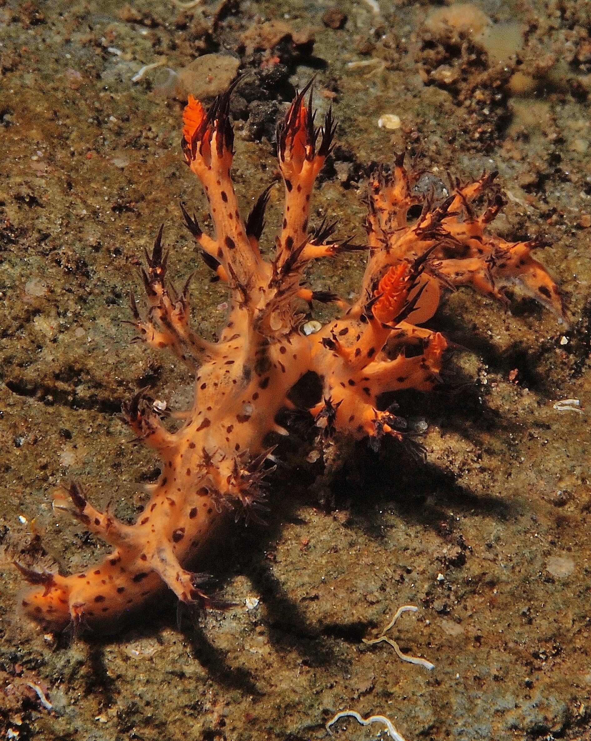 Pareja de Dendronotus regius copulando. Los animales se sitúan uno frente a otro, aproximándose hasta enfrentar sus aperturas genitales, en la parte anterior lateral derecha del cuerpo, siendo penetrados y penetrando a su vez al otro.